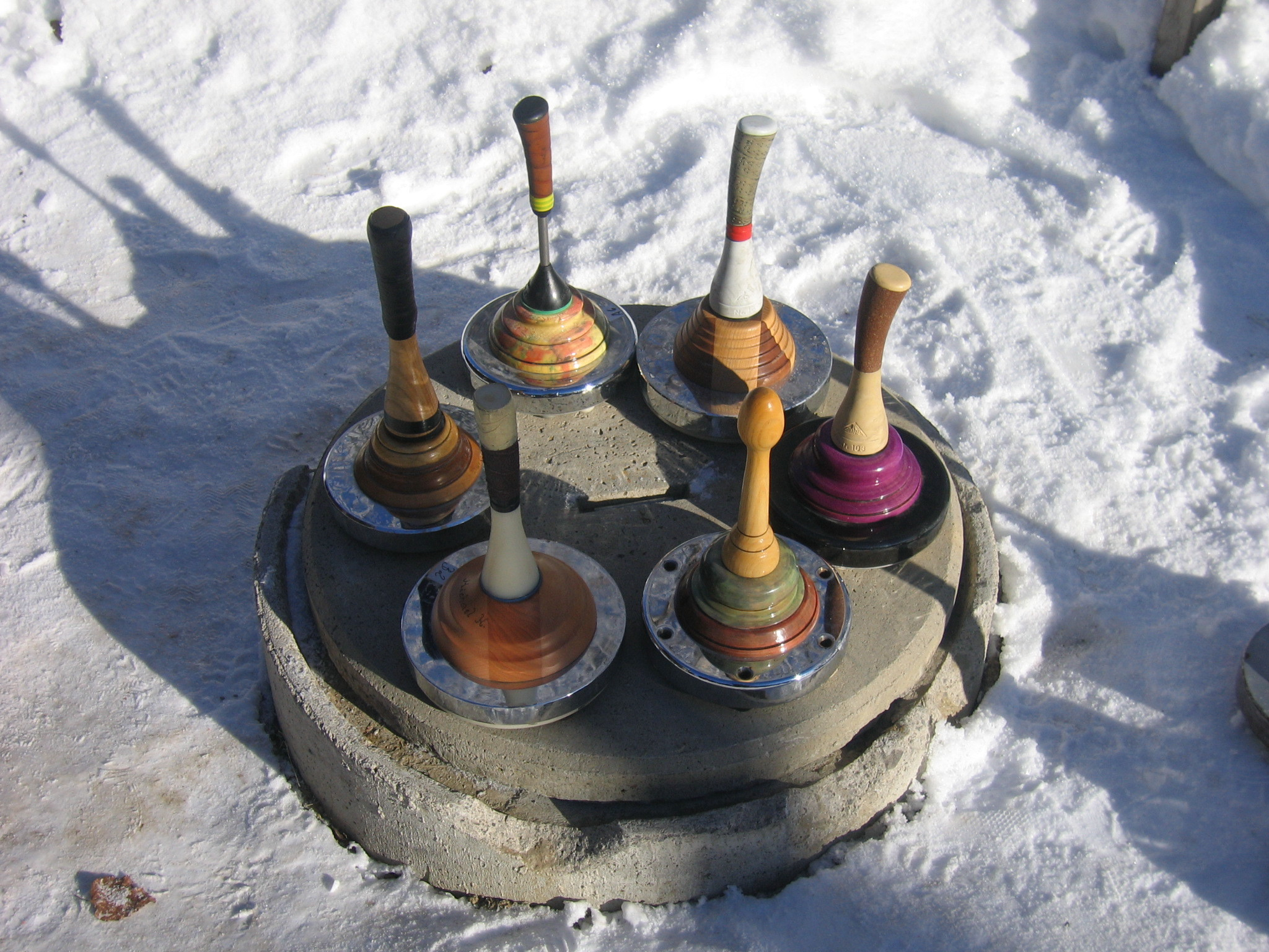 Eisstock